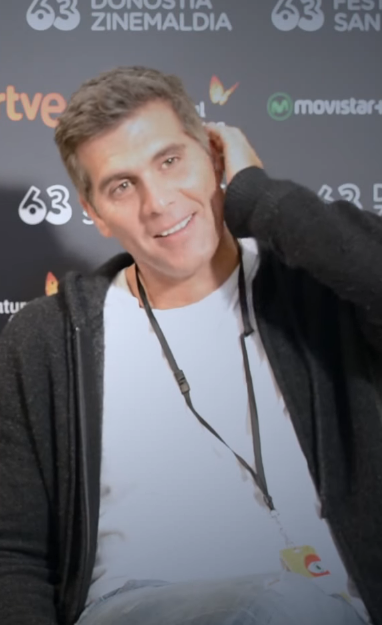 Entrevista con Salvador del Solar y Christian Meier